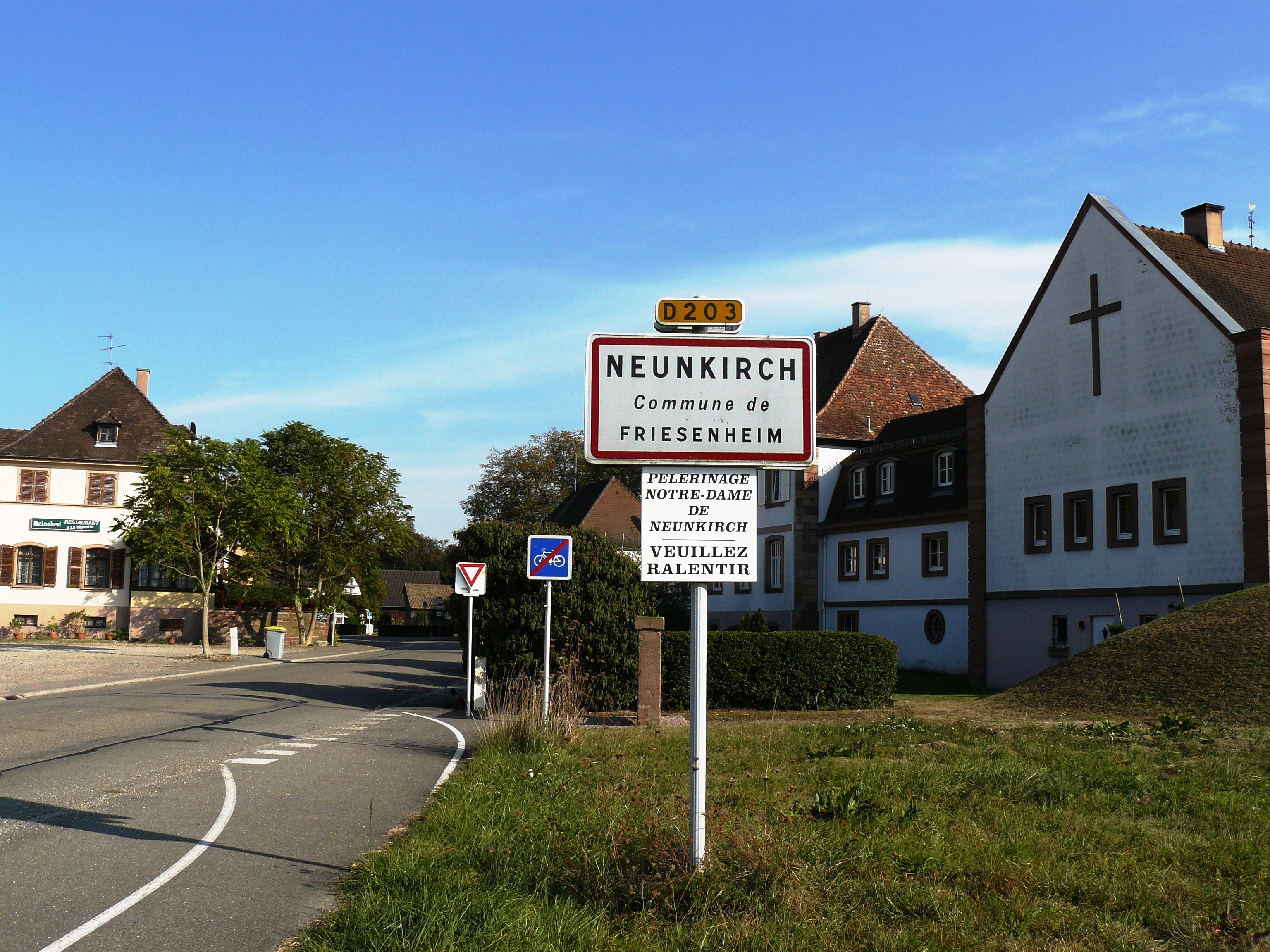 Le hameau de Neunkirch, commune de Friesenheim